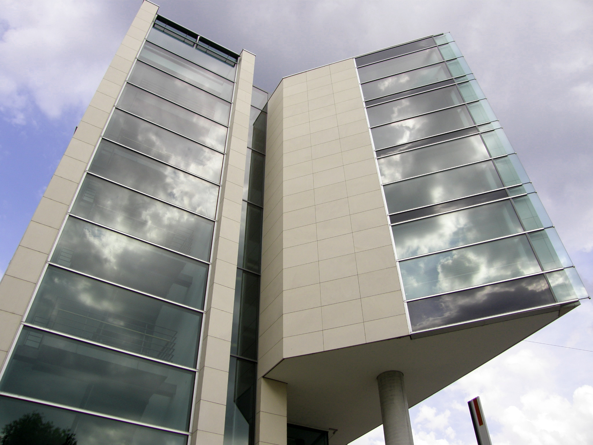 Ansicht des Servicegebäudes der Handwerkskammer Region Stuttgart, Heilbronner Straße 43, 70191 Stuttgart